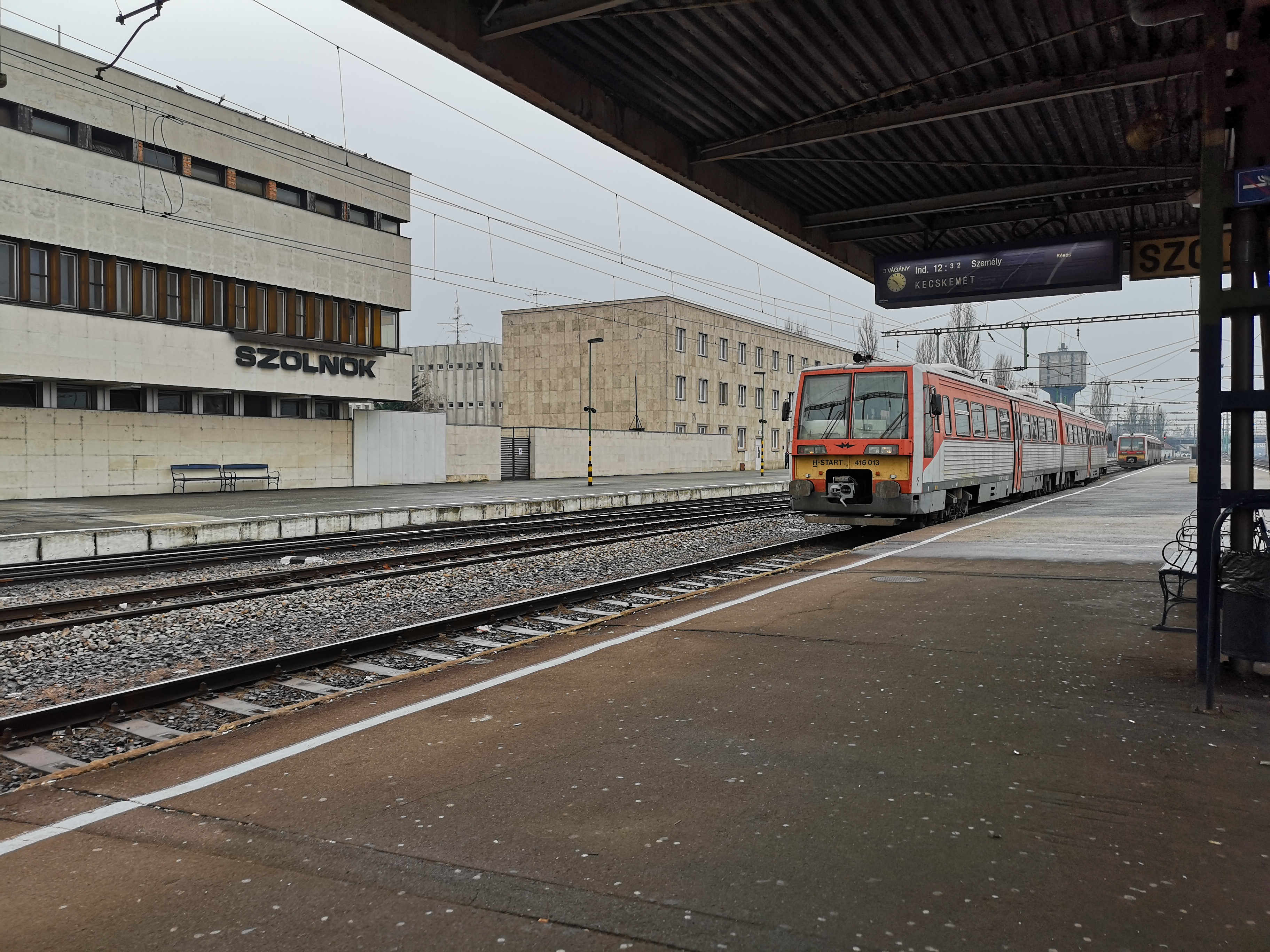 Uzsgyi becenevű motorvonat, Szolnok felirat